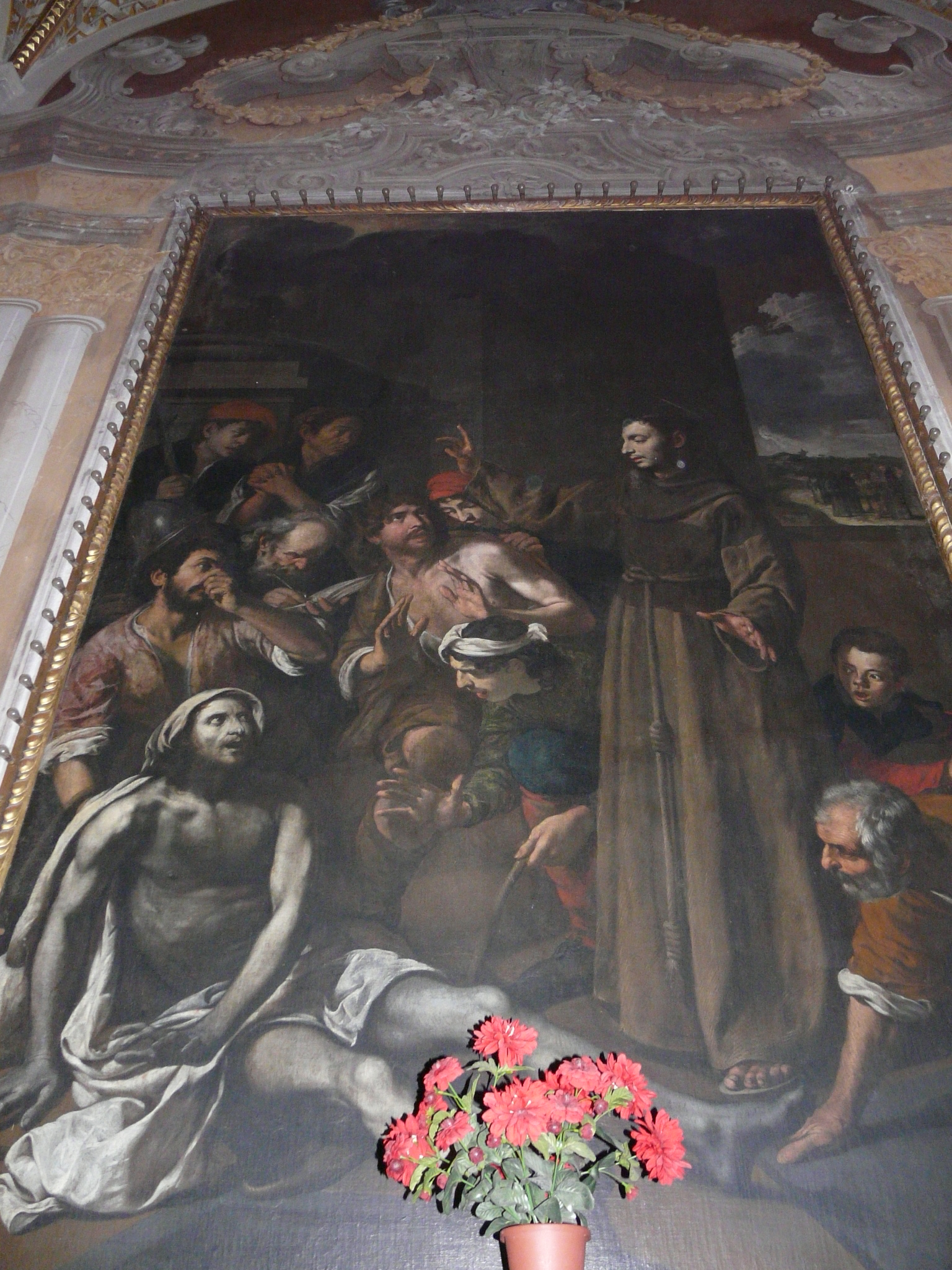 Dipinto del pittore Giovanni Battista Borzone (Sant'Antonio risuscita un morto) della chiesa di San Francesco, Rapallo, Liguria, Italia